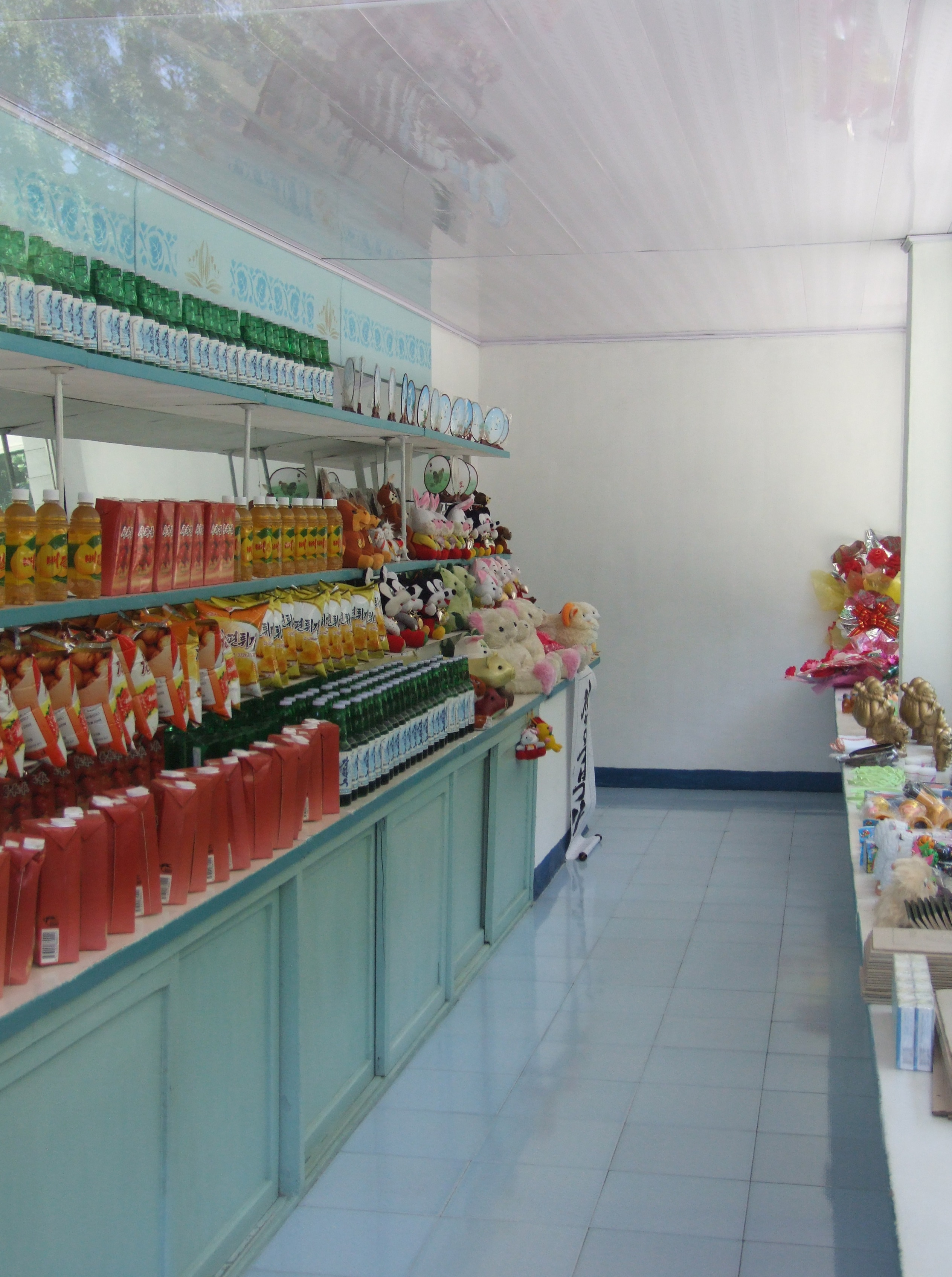 Geschäft am Geburtsort von Kim Il-sung